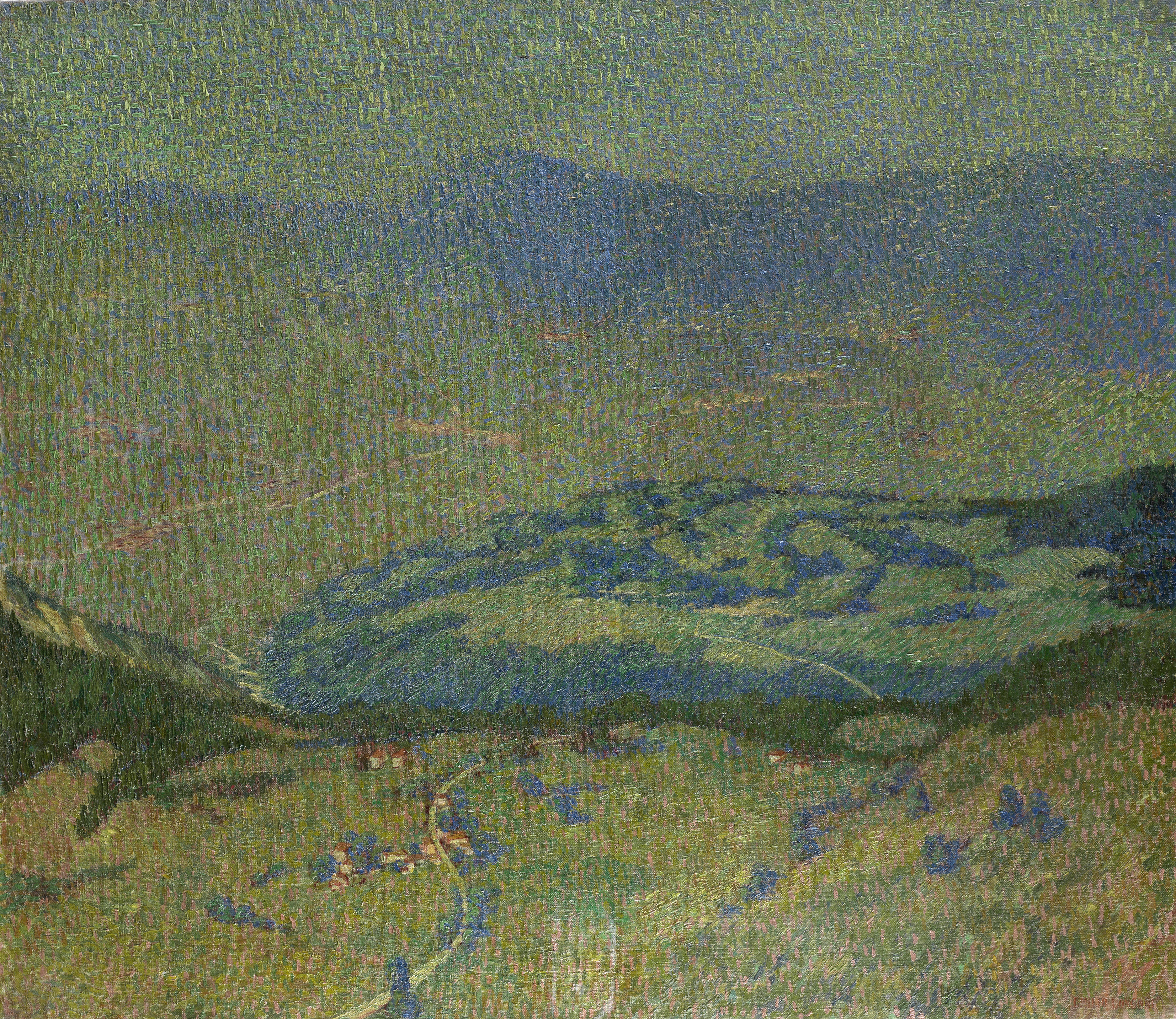 Paesaggio in Valtellina.